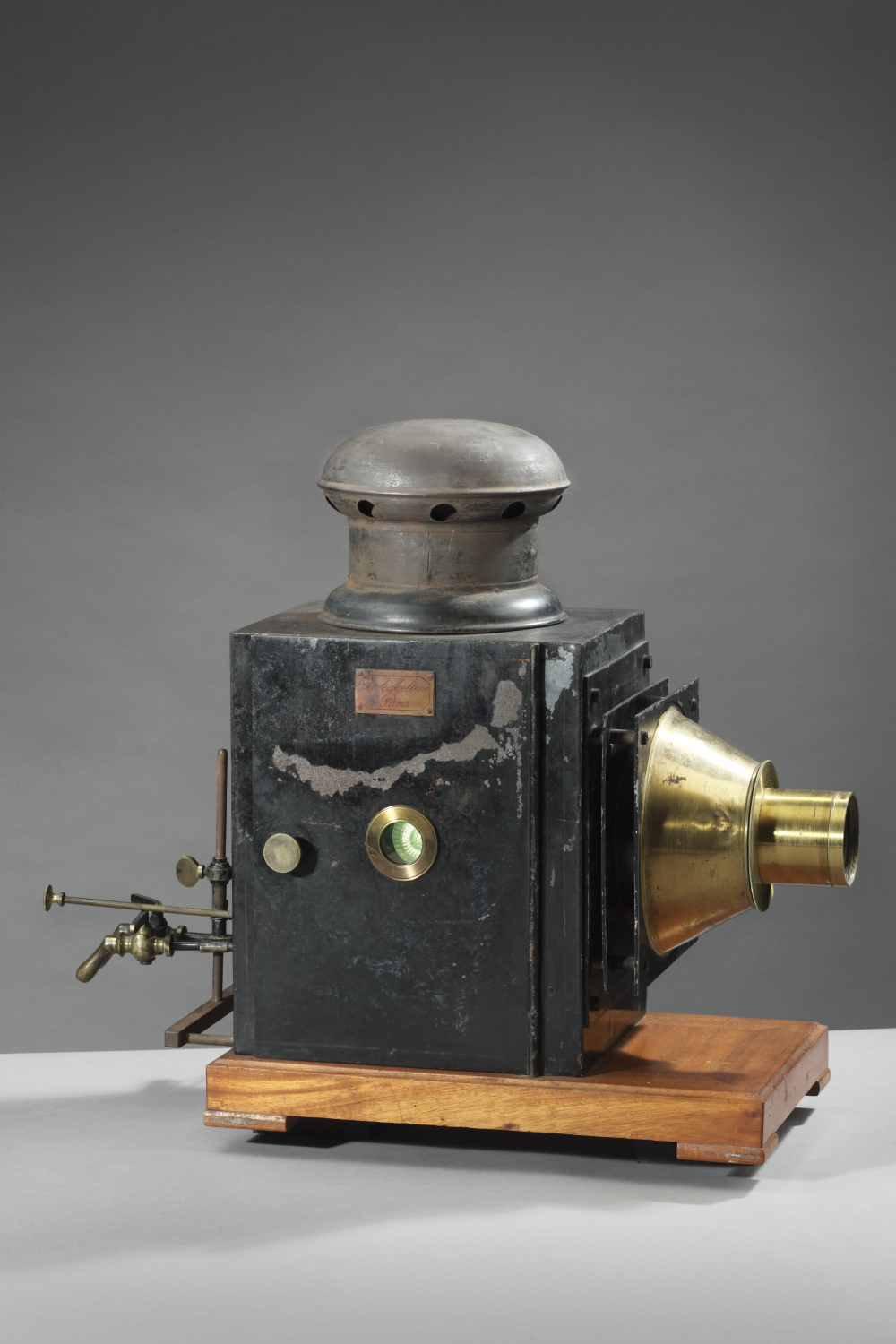 Lanterne de Projection, Maison Molteni (Fabricant. Le corps est en tôle de fer noircie, la partie objectif est en laiton vernis. Il dispose d’un double condensateur et d’un passe-vue pour diapositive au format de 85 x 100 mm. Un brûleur oxhydrique assure la lumière.